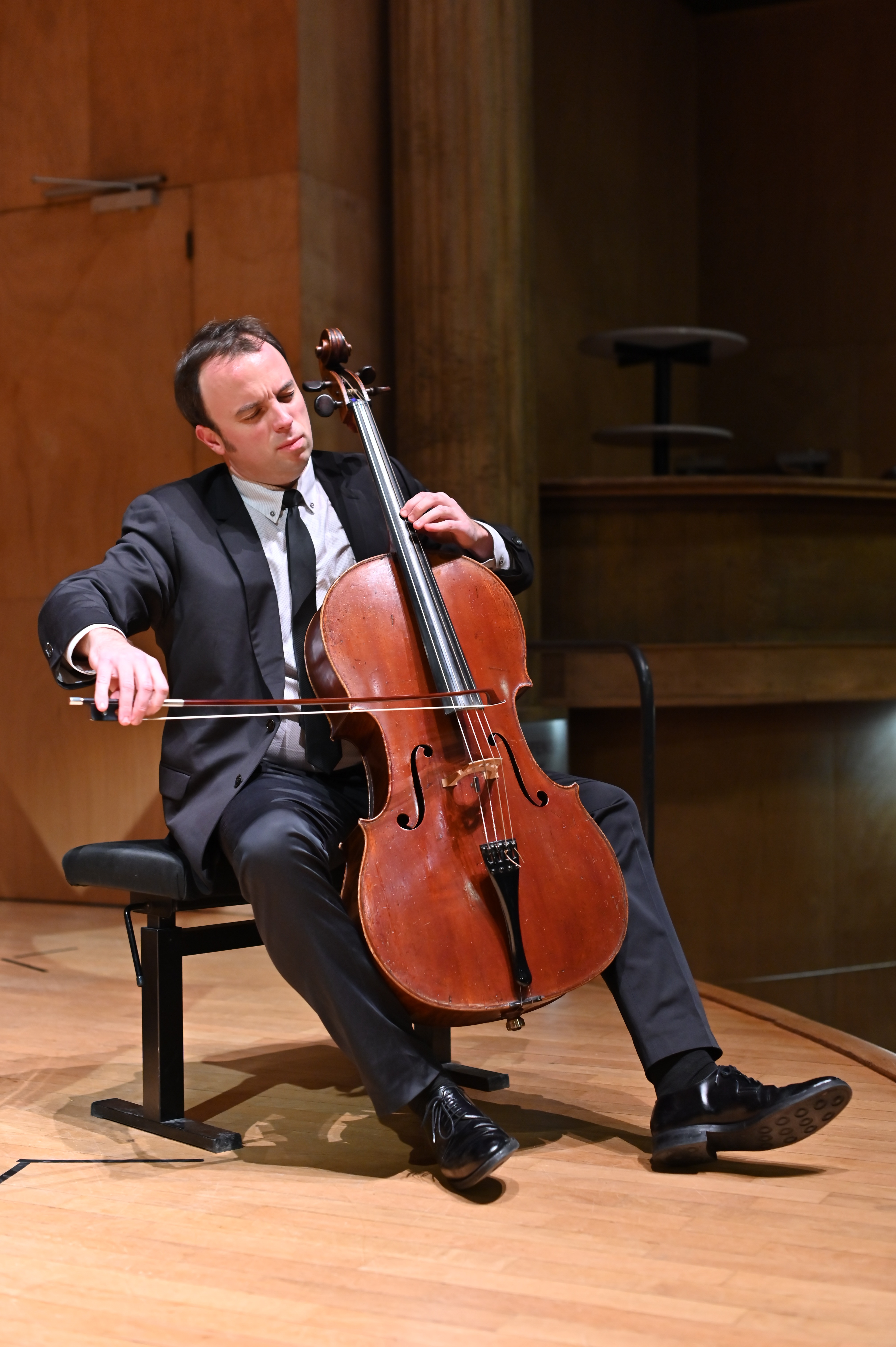 Paris salle Cortot, 2019, photographie Manuel Gouthiere